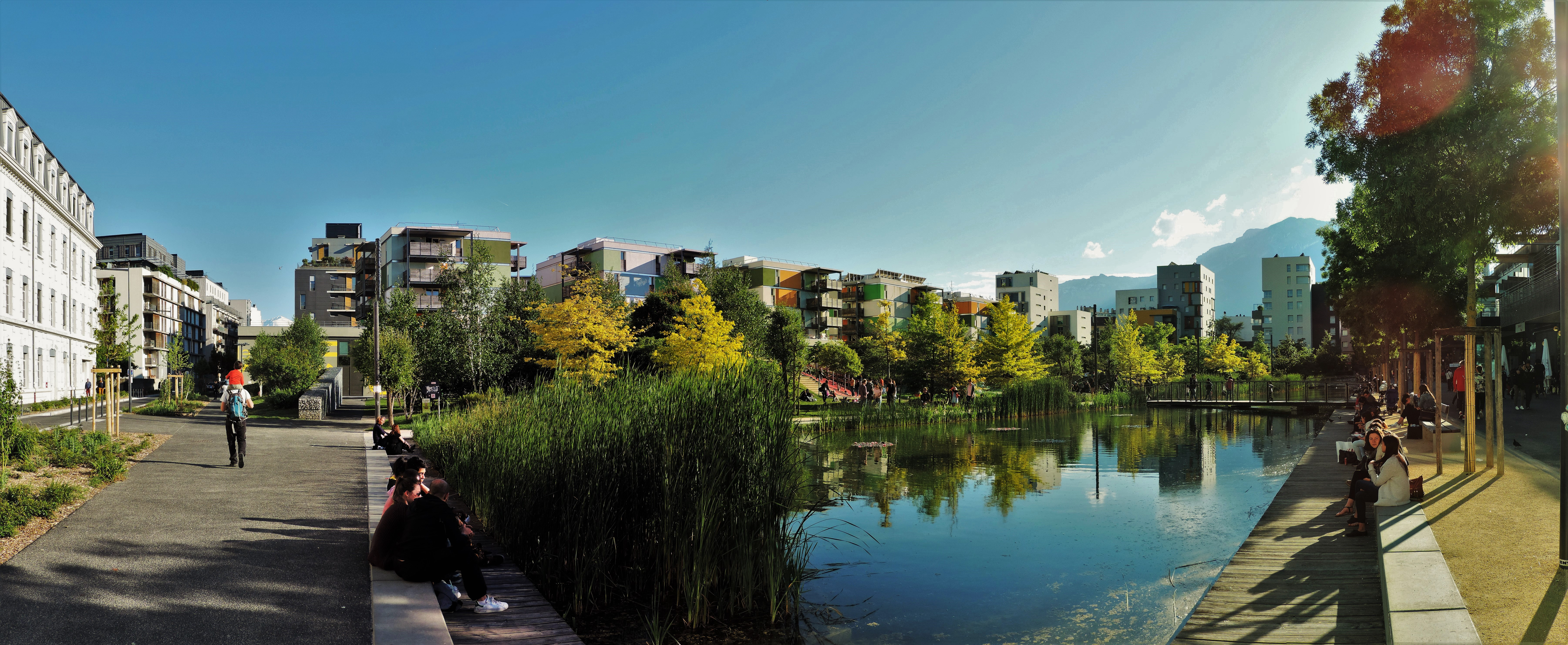 Écoquartier de la Caserne de Bonne et son parc paysagé.